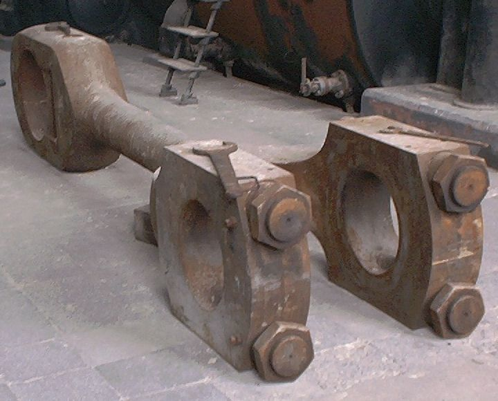 Pleuel eines Großverdichters